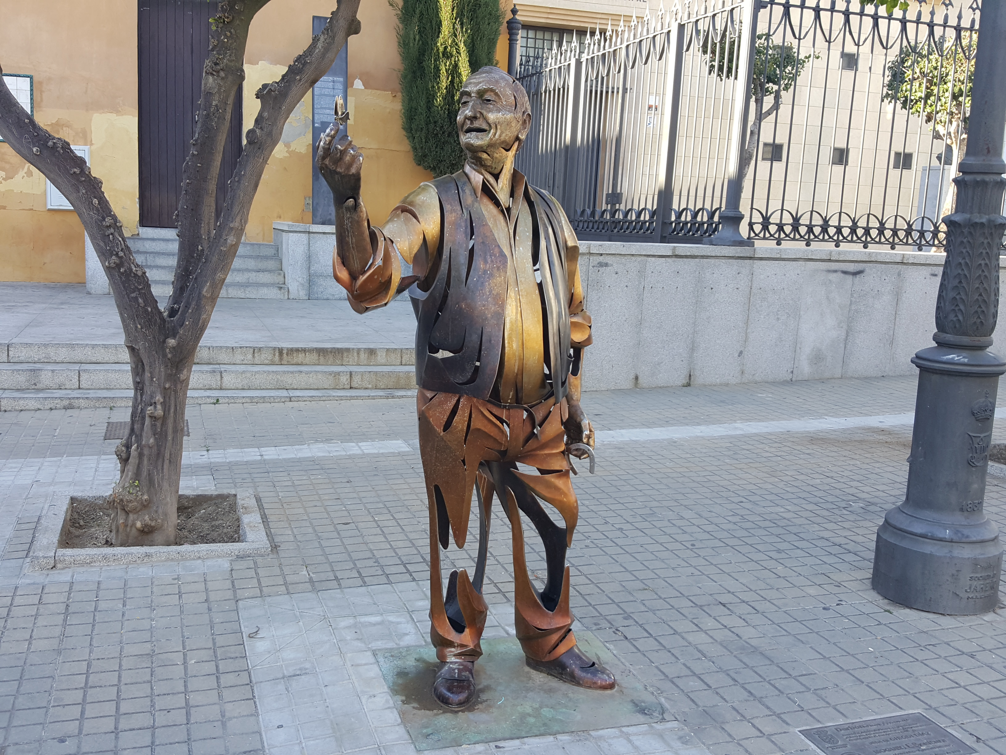 Escultura perteneciente al Museo al aire libre Moguer EScultura de Moguer, Andalucía (España). Escultura incluida en la serie PlateroEScultura con el nombre "Darbón".